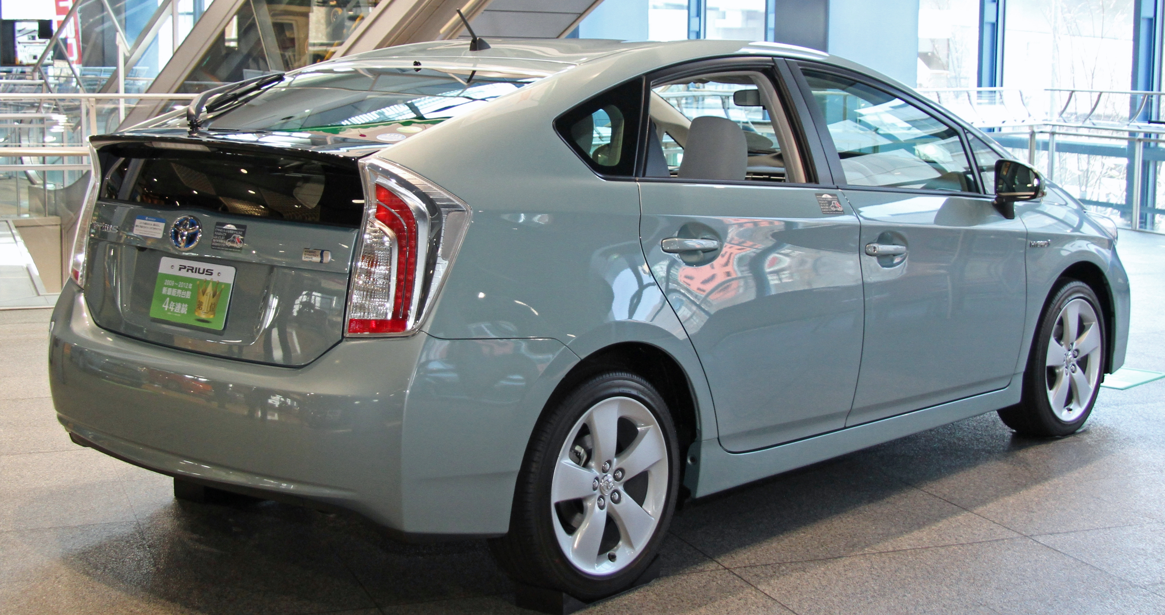 Toyota Prius